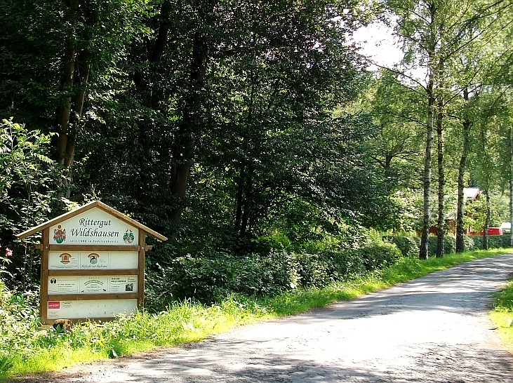 Hinweis Rittergut Wildshausen, Arnsberg (Germany)